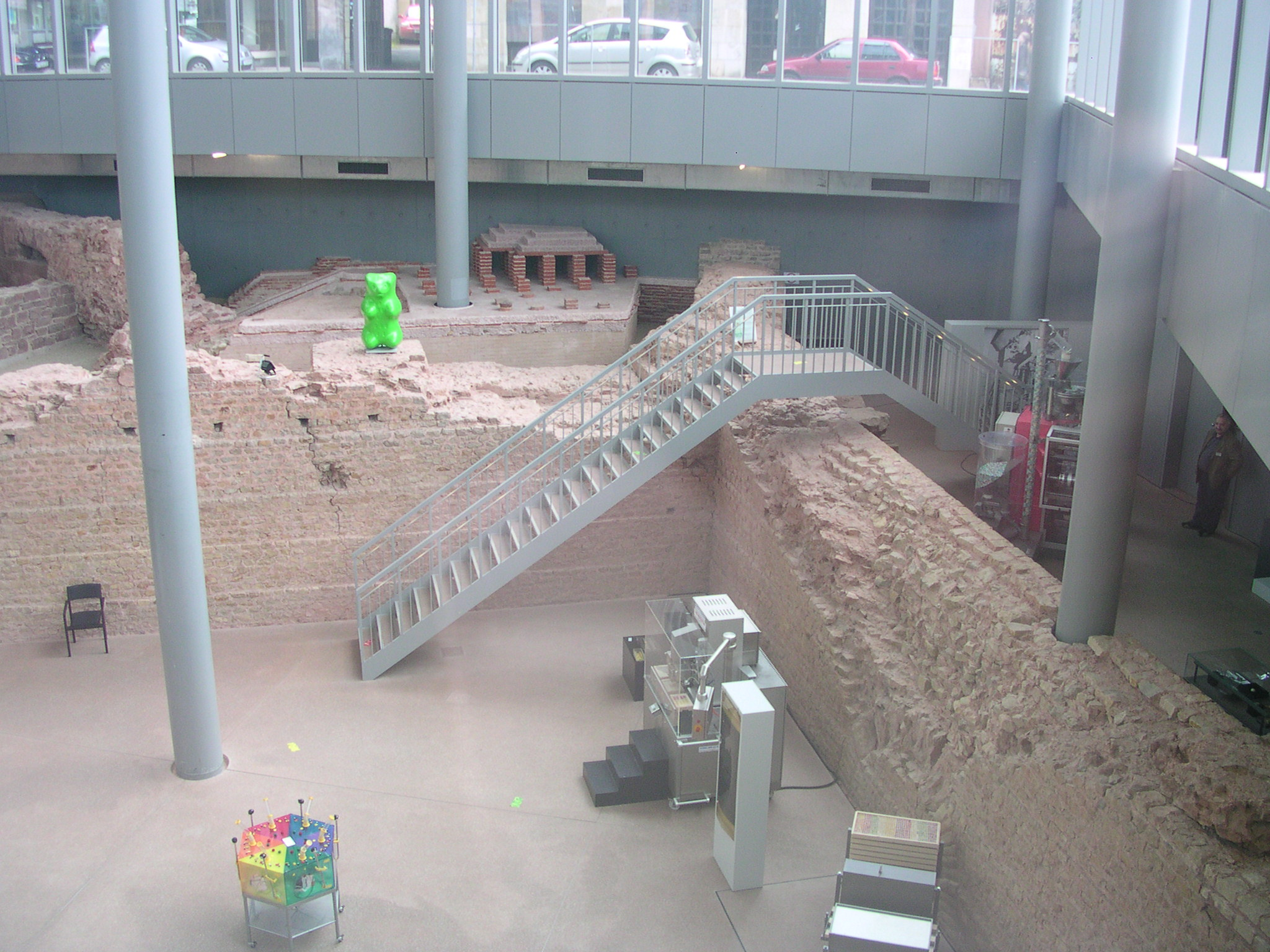 Viehmarktthermen in Trier mit einer Ausstellung über Gummibärchen: Vorne links der größte Raum der römischen Thermen, im Hintergrund (rechts vom grünen Gummibärchen) Reste der römischen Fußbodenheizung (sog. "Hypokaustum") – kurze, geziegelte Pfeiler, auf denen der Fußboden ruhte. Links hinten Reste der Gebäude des Kapuzinerklosters, die über einem Teil der Thermenanlage erbaut wurden.